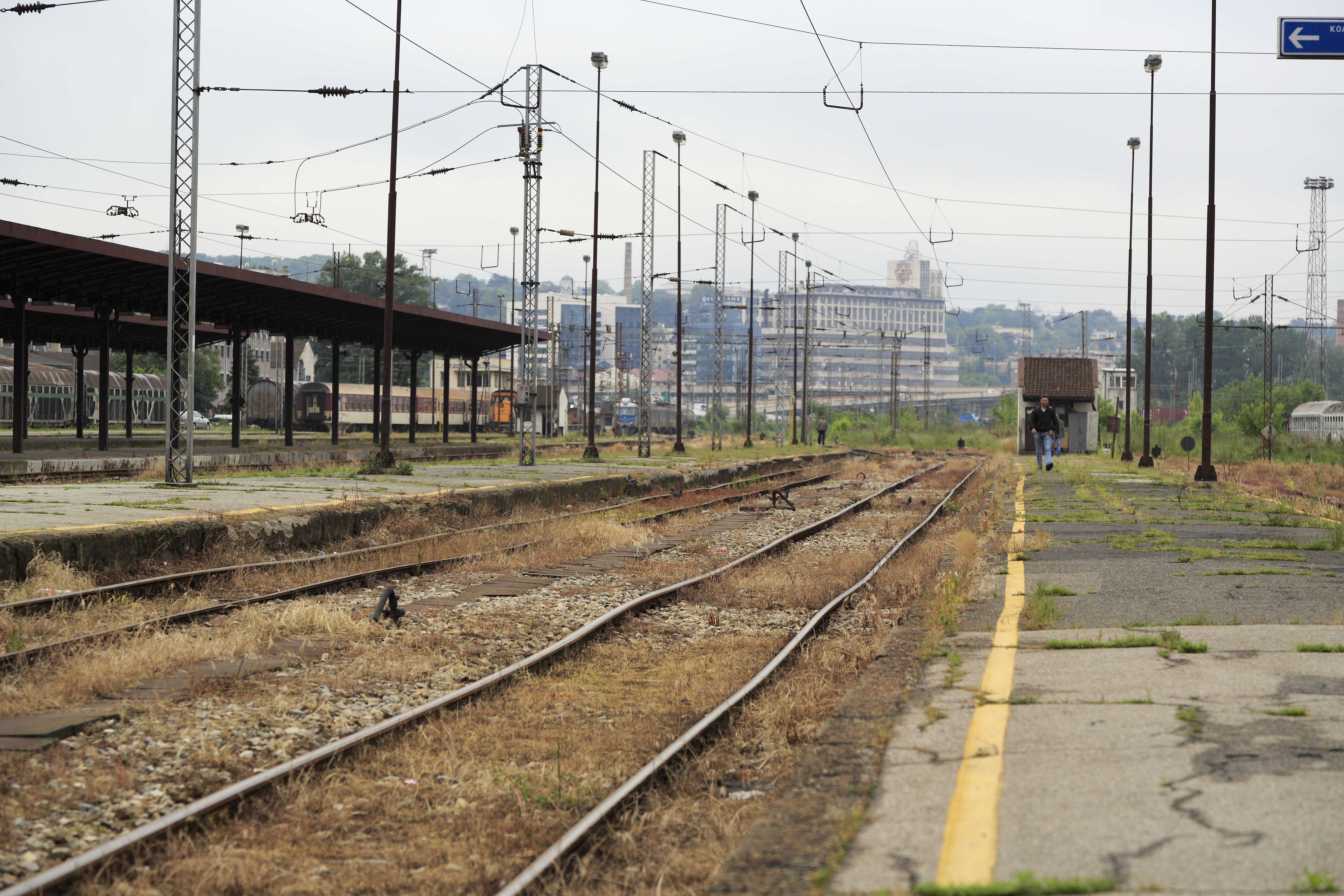 Der etwas rustikale Oberbauzustand ist im gesamten Bahnhof ähnlich, doch auf den äußeren Gleisen besonders schlecht. Offenbar soll der Gesamtverkehr nun doch nach Beograd Centar verlagert werden, weswegen keine Unterhaltungsarbeiten mehr ausgeführt werden. Doch gibt es diesen Plan schon mindestens 25 Jahre und auch 1990 hatten die Anlagen keine Schnellzugqualität.